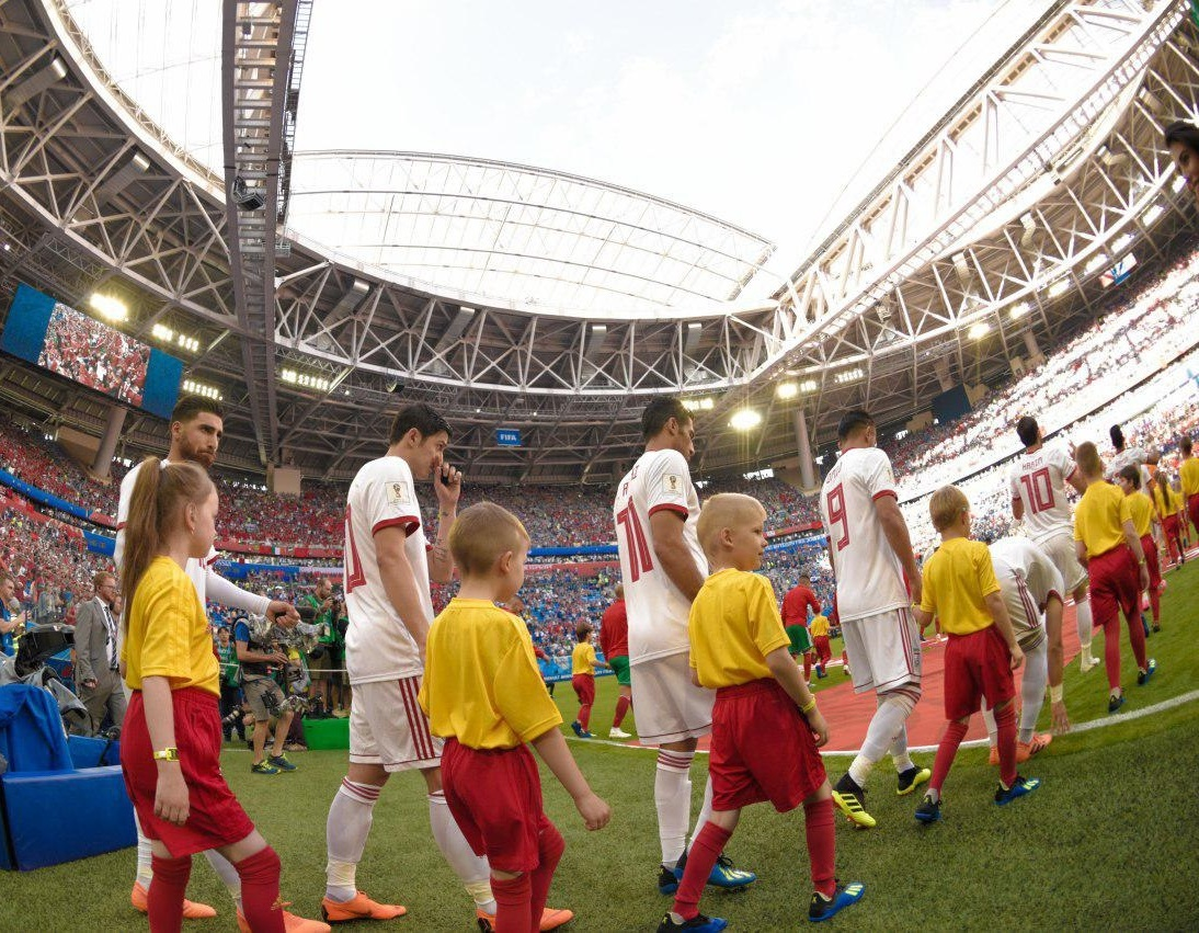 بازی تیم فوتبال ایران و مراکش در جام جهانی ۲۰۱۸